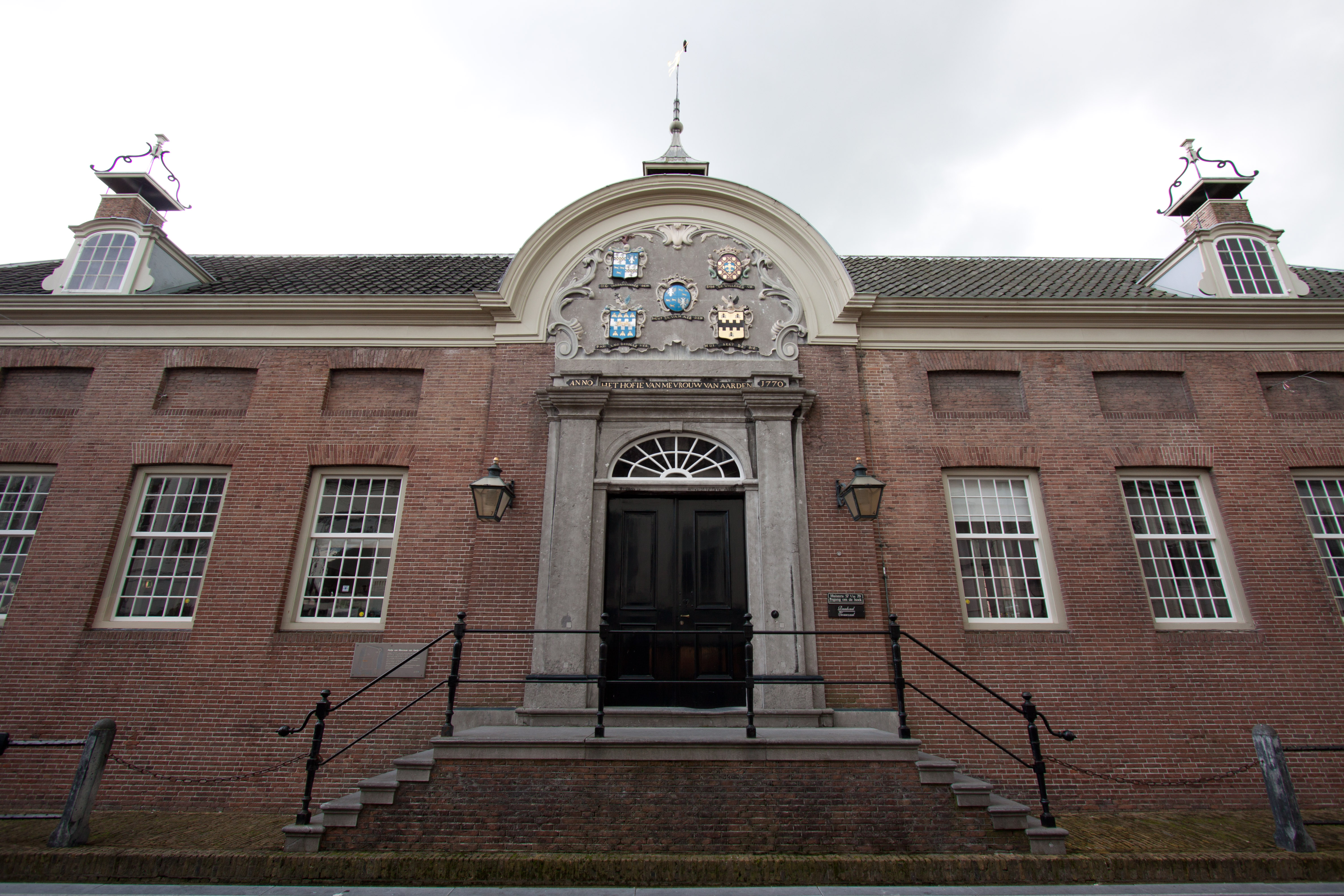 100831-141734_ 5057_50D.CR2